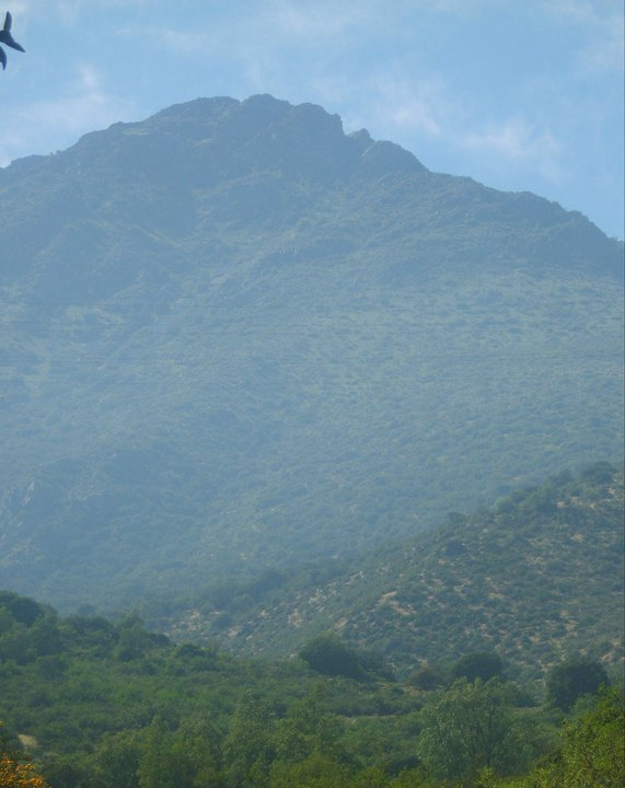 Cerro La Cruz de La Laja, Villa Lourdes, Los Santos, Panamá